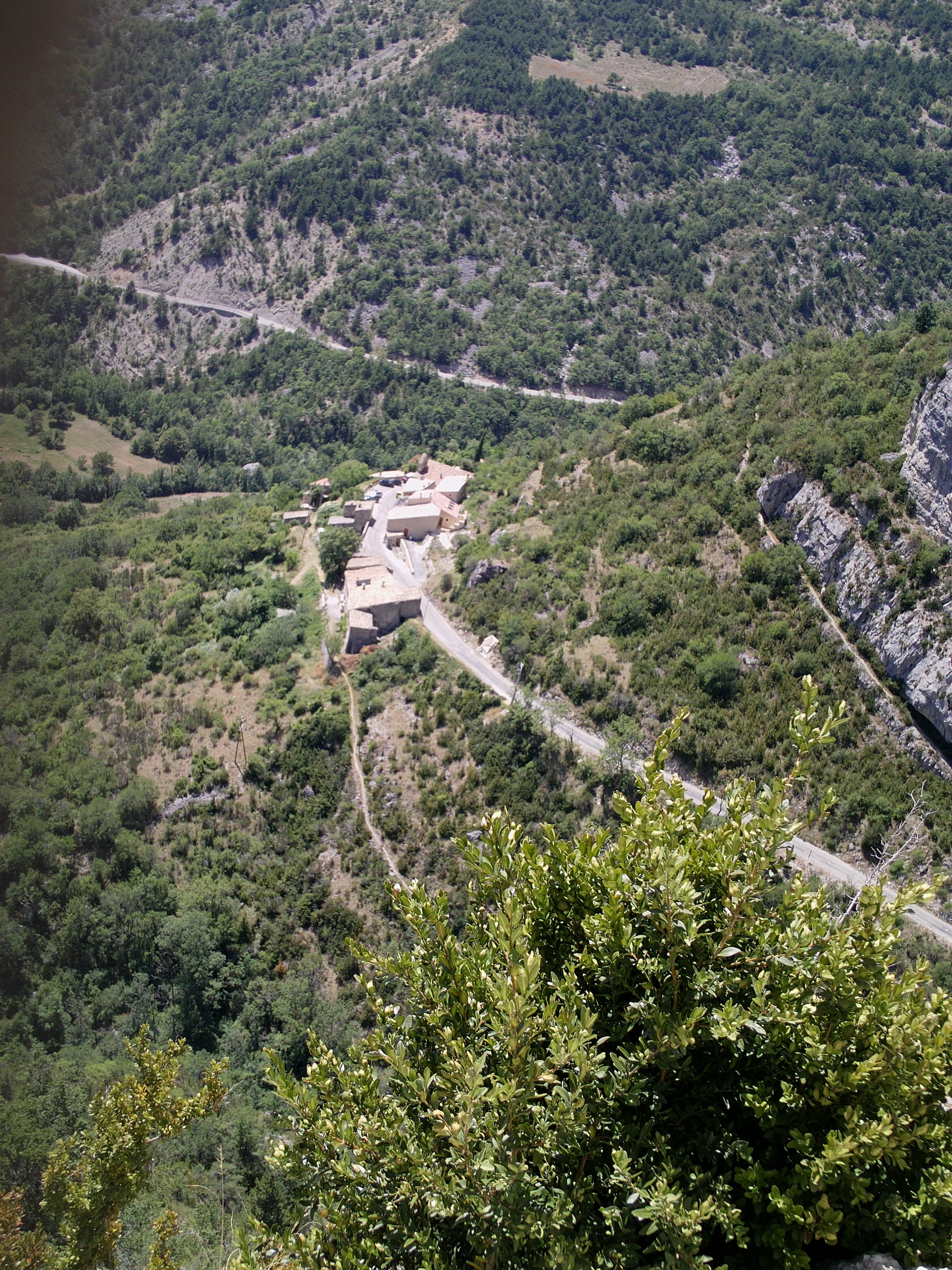 pas d'echelle